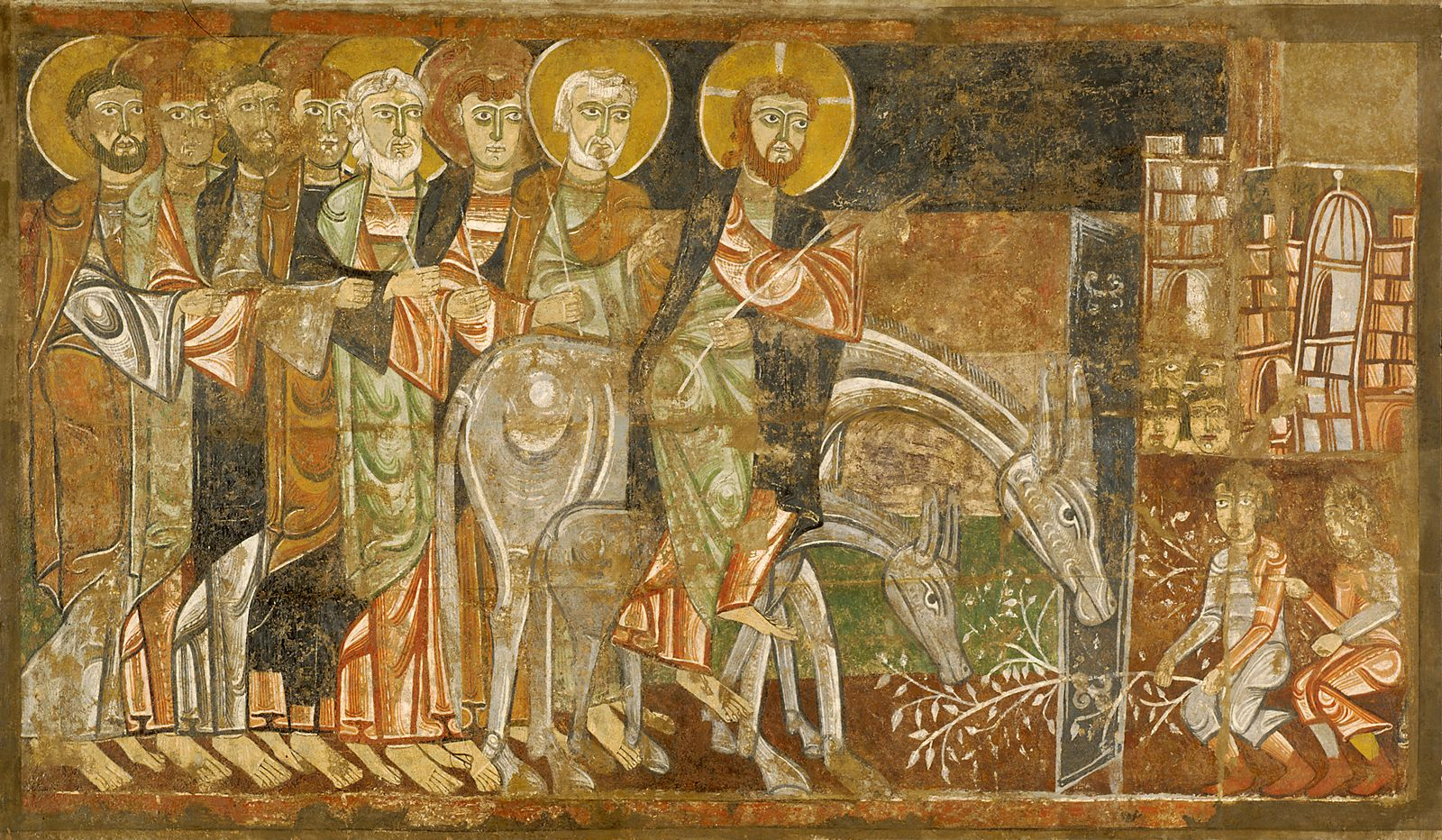 Entrada de Jesús en Jerusalén, fresco traspasado a lienzo procedente de la ermita de San Baudelio de Berlanga (Soria), Indianapolis Museum of Art.